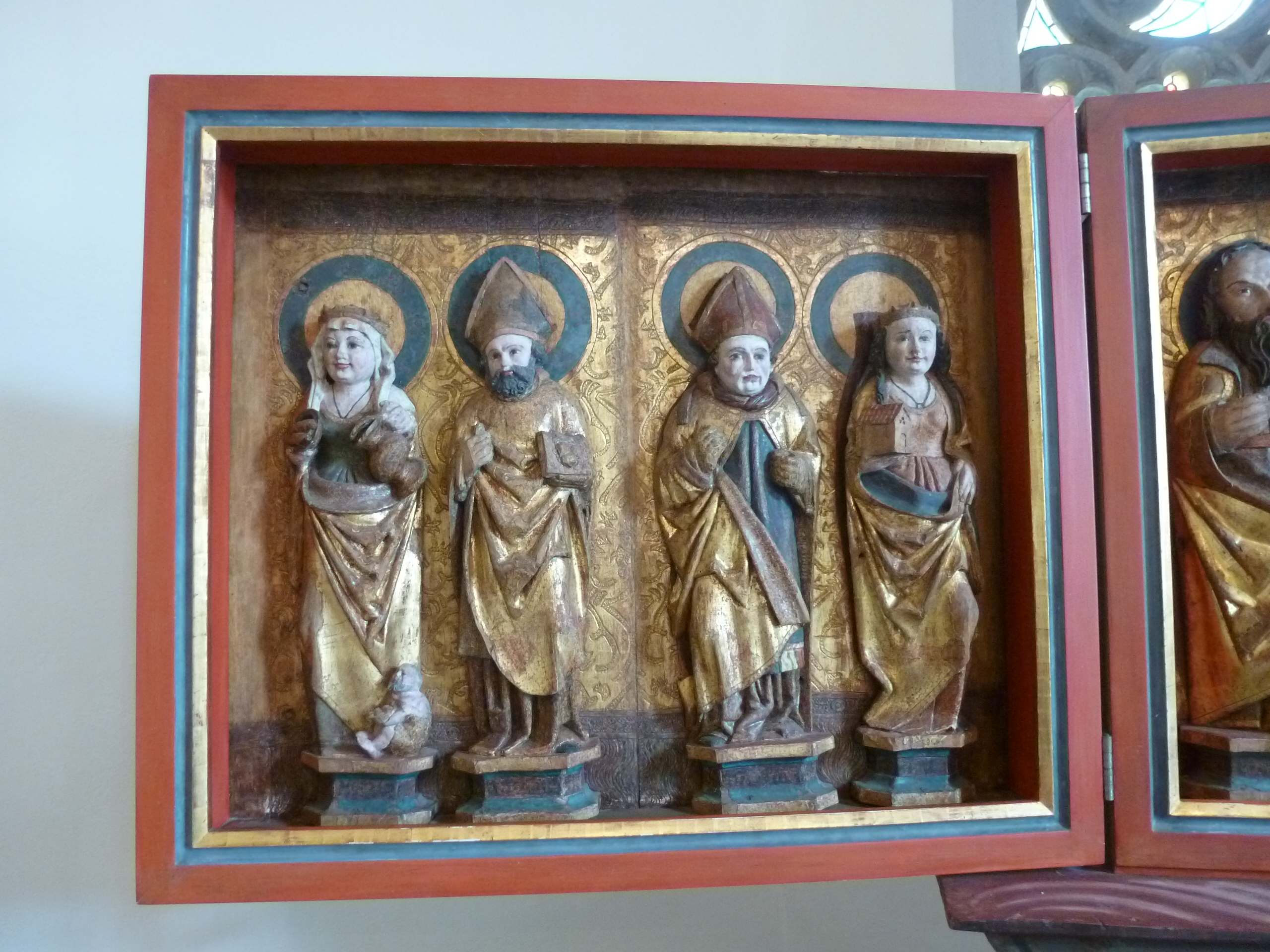 Altar der Evangelischen Kirche St. Gotthardt, Rohnstedt, Großenehrich, Thüringen, Deutschland